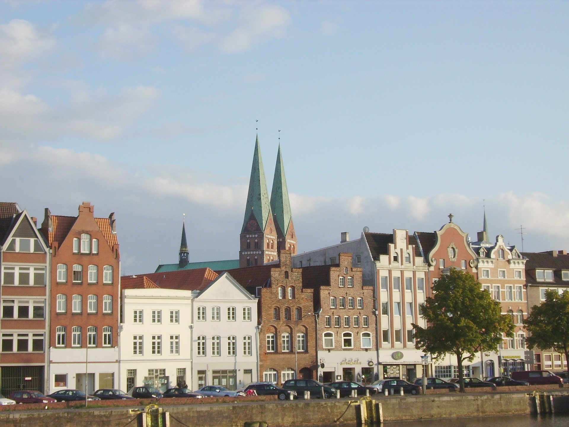 Blick auf Lübeck über die Untertrave auf die Innenstadt mit Marienkirche